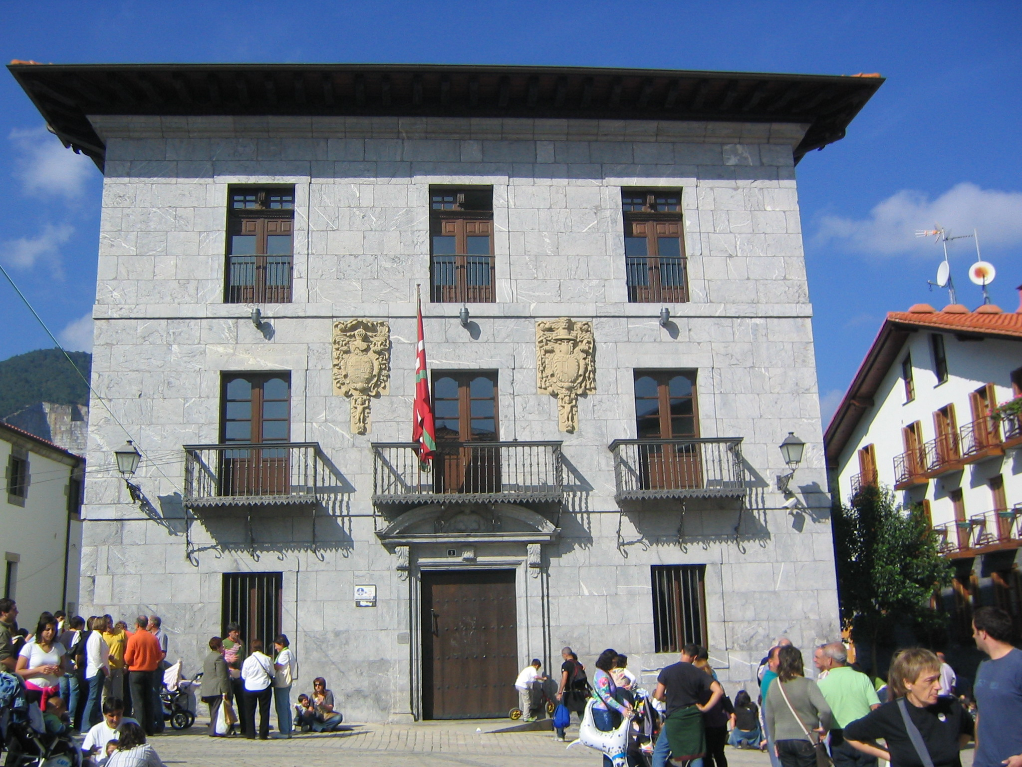 Palacio de Solartecua o Palacio de Mugartegui, actual casa consistorial. Markina, Vizcaya, País Vaco, España.